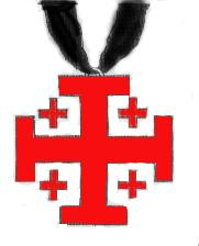 Ordre_du_st_Sépulcre_créé par Baudouin_I_en 1103_et confirmé par le pape Innocent_VIII_en 1477, tel que porté en France, la Croix de Jérusalem entouré des quatre croix de gueule rappelant les plaies de notre Seigneur.